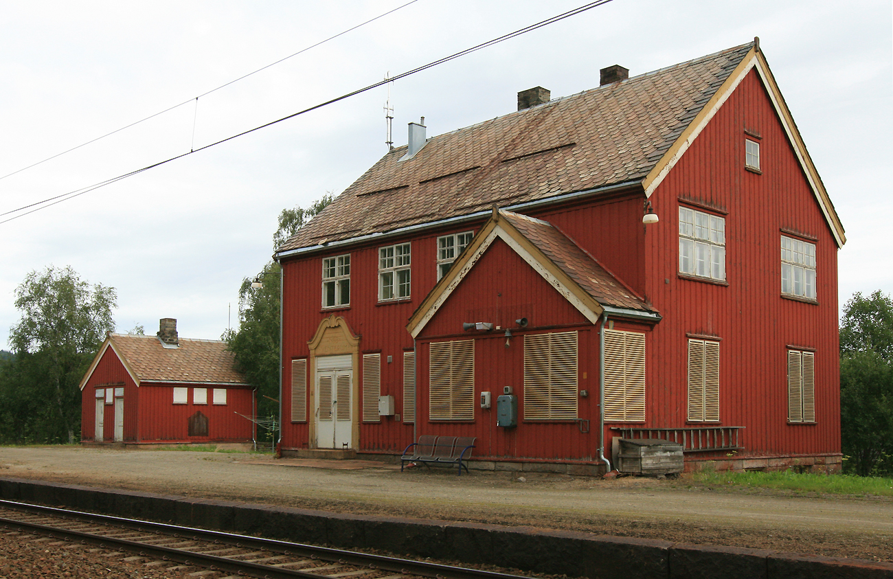 Soknedal stasjon, Dovrebanen